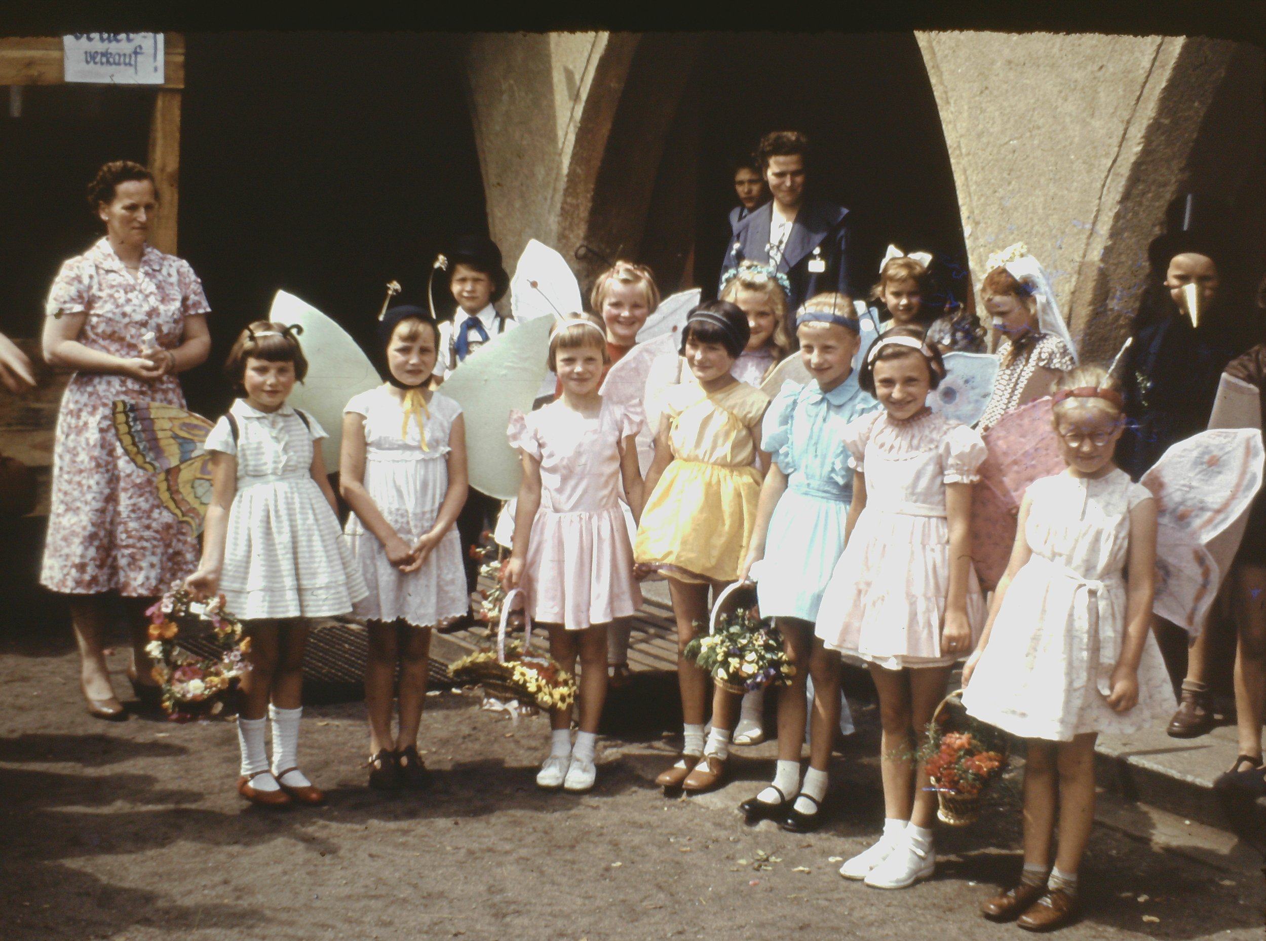 Schulfest Lessingschule, Großpostwitz, 1959